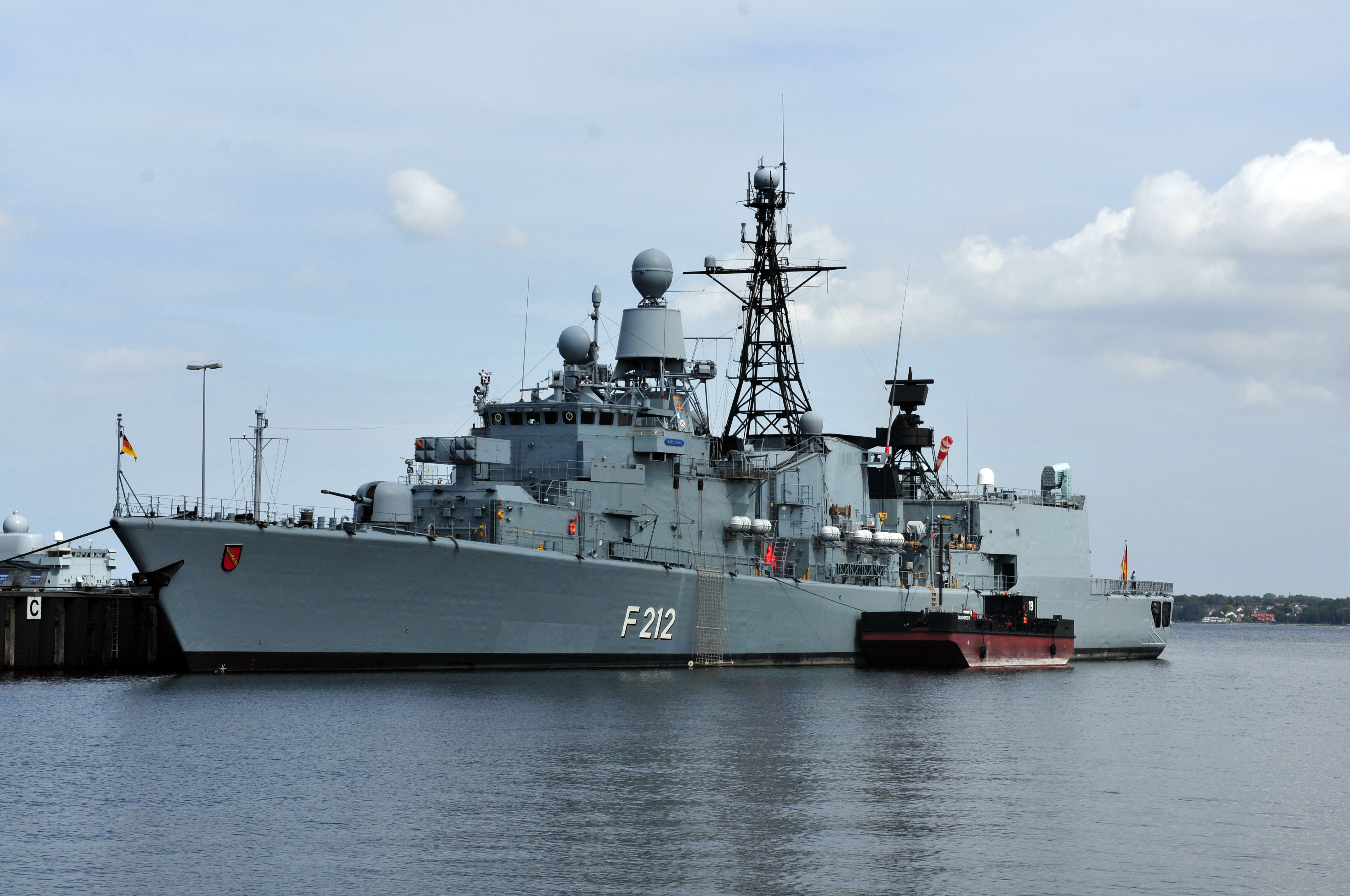 Landtagsprojekt Schleswig-Holstein; Marinestützpunktkommando Kiel